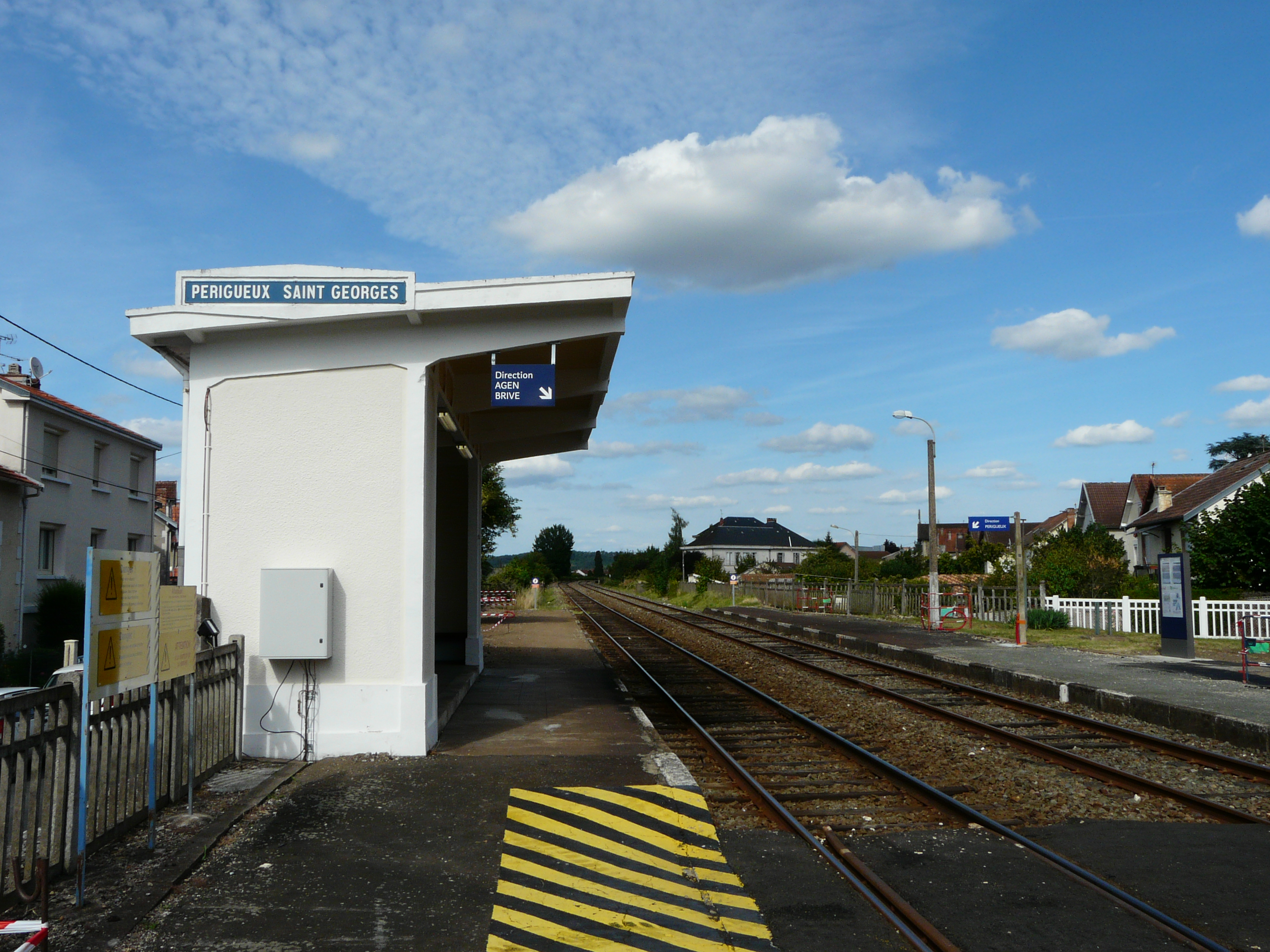 Les voies en gare de Périgueux-Saint-Georges, Périgueux, Dordogne, France. Vue prise en direction de Niversac.